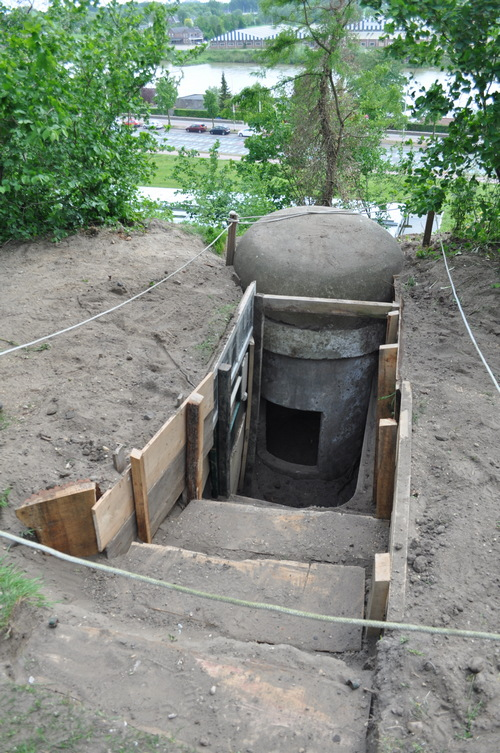 Kochbunker in de tuin van het Museum Arnhem